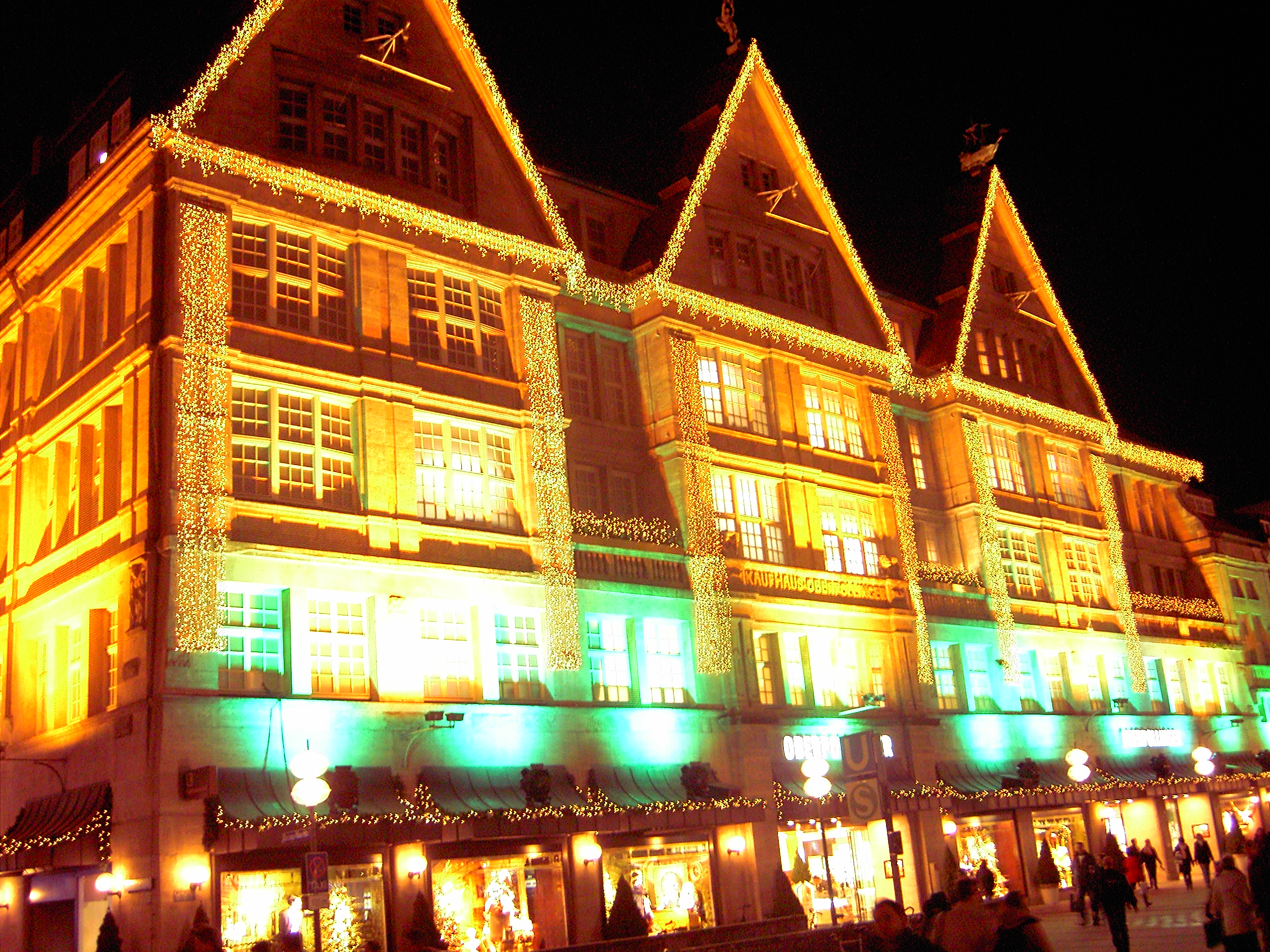 Bilder aus dem vorweihnachtlichen München